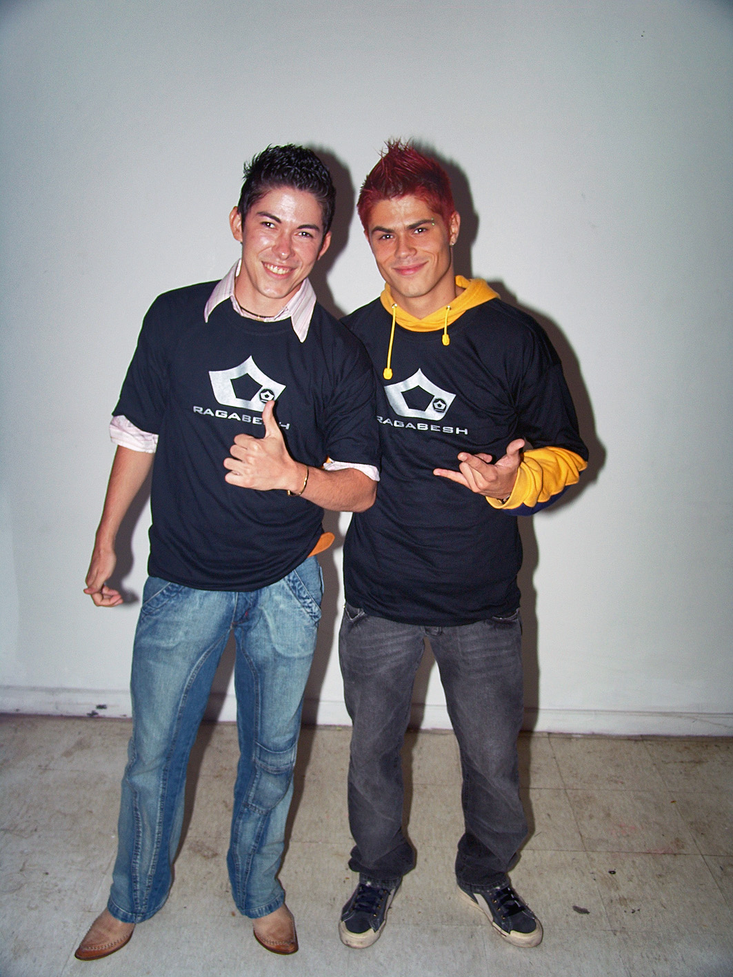 Os cantores Leandro Lopes e Osnir Alves em 2007.